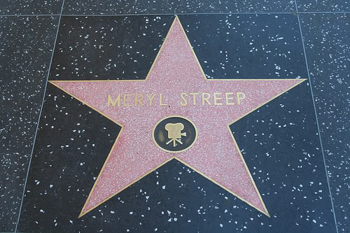 Stella di Meryl Streep sulla Hollywood Walk of Fame, Los Angeles (California)